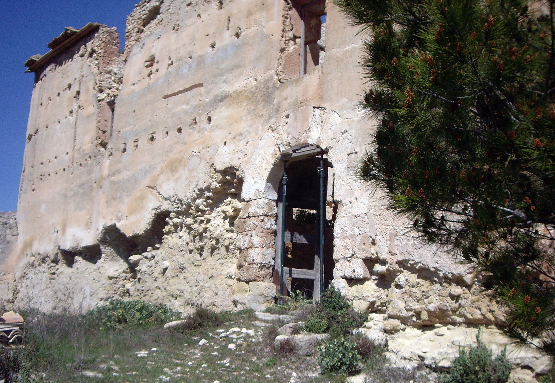 Estat actual del castell de Barxell